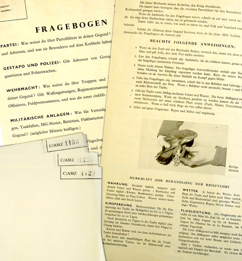 Fragenbogen an Tauben befestigt im Rahmen der Operation Periwig.